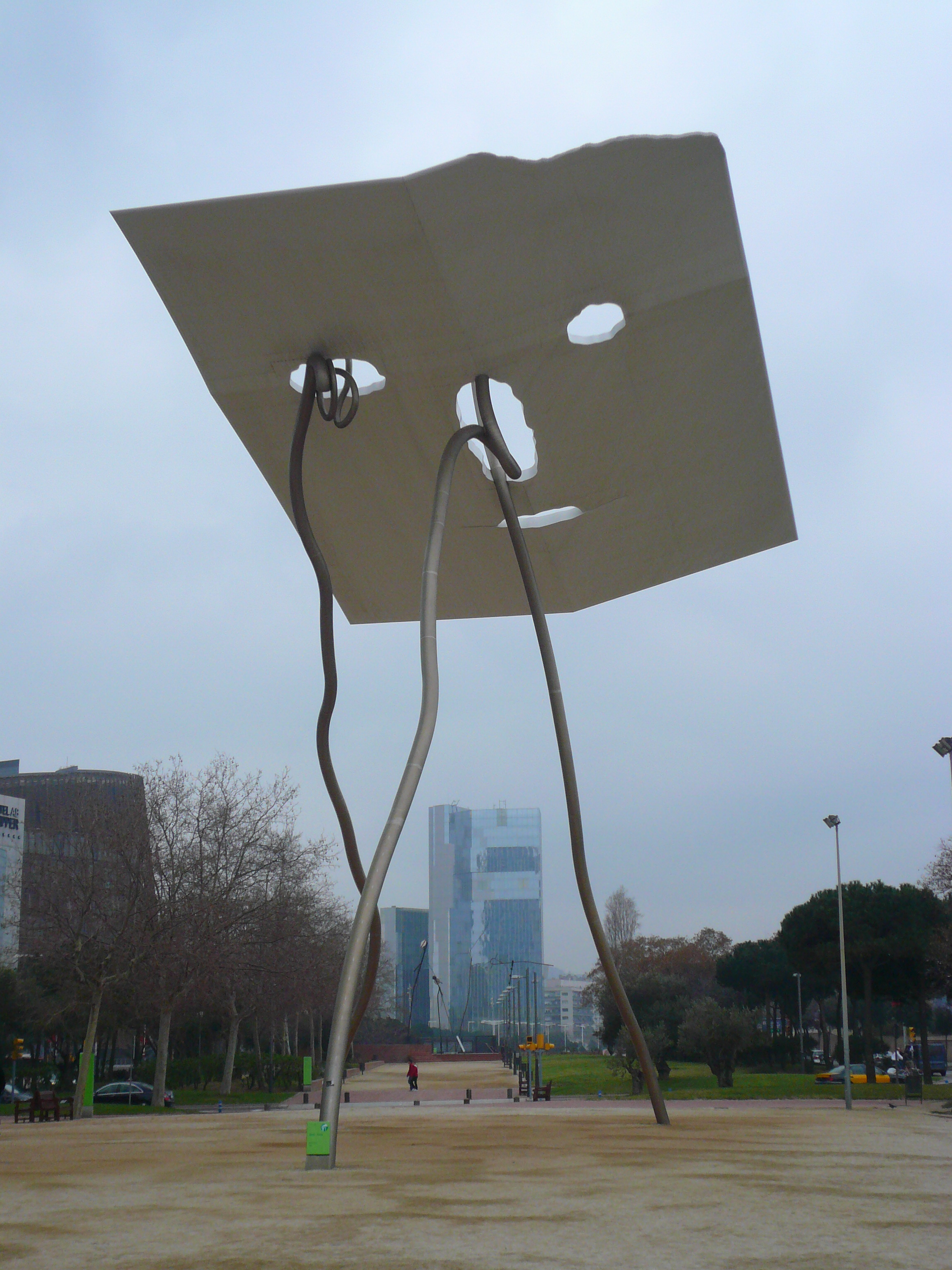 David i Goliat. Parc de les Cascades davant la pl. dels Voluntaris (Barcelona). Escultor: Antoni Llena. Material: acer inoxidable, acer pintat i resina. 1992. 24″ N, 2° 11′ 43.69″ E